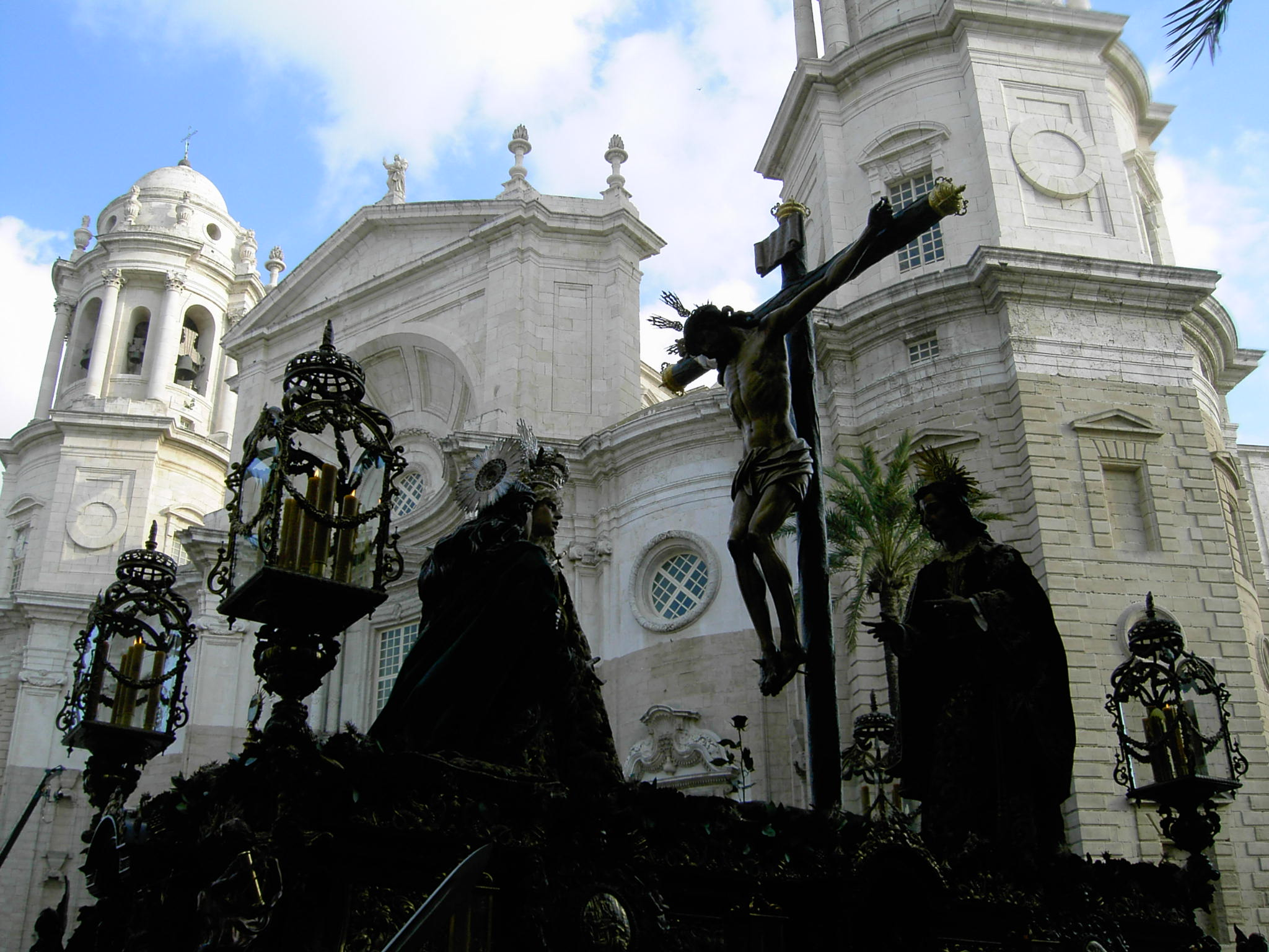 Paso de misterio de la Cofradía de la Piedad.